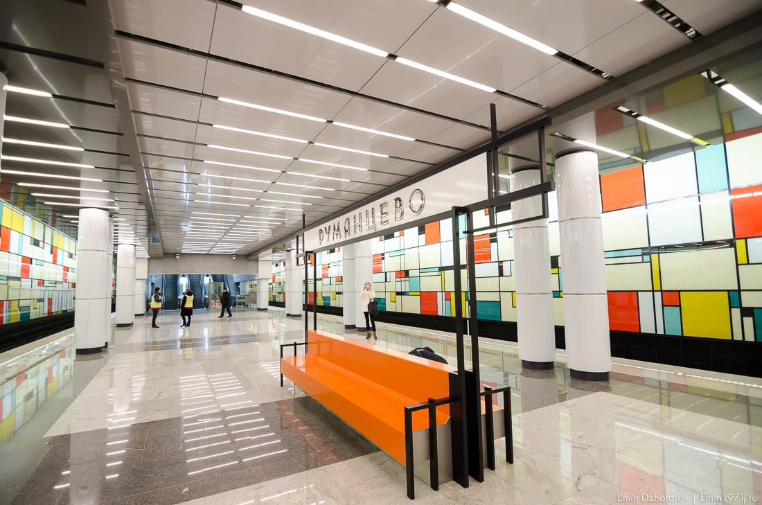 Станция метро «Румянцево» в день завершения строительных работ